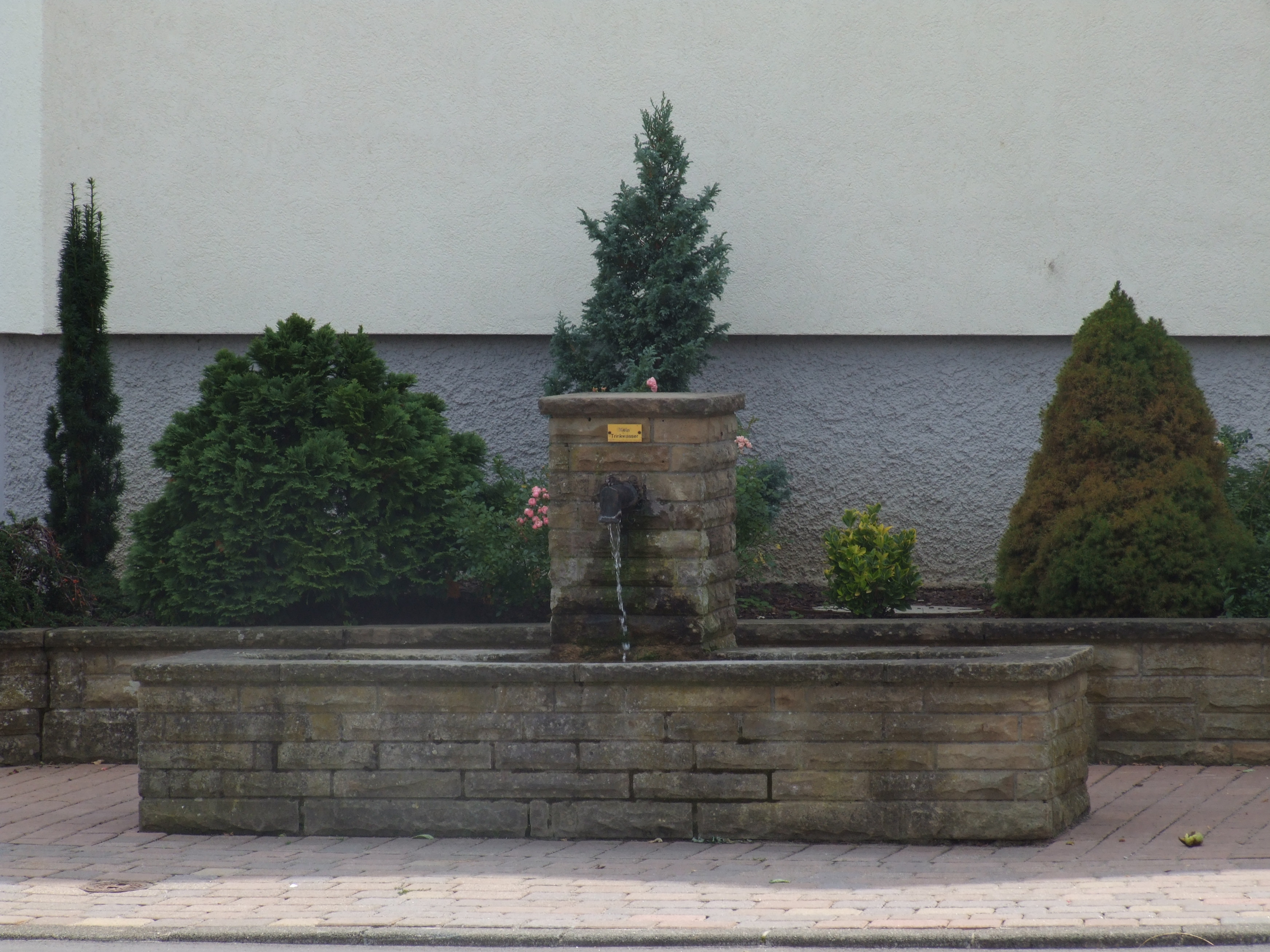 Brunnen an der Kreuzung der Durstbüttenstraße, der Kandelstraße und der Brunnengasse in Eschelbronn